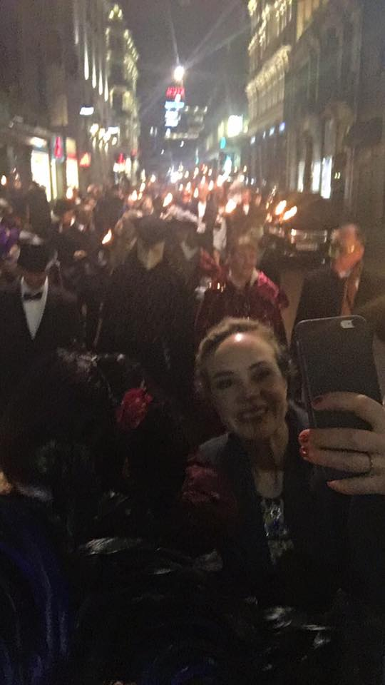 Historisk kostymeopptog i Karl Johans gate 6. februar 2016